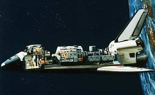 * Motiv: Shuttle Schnitt